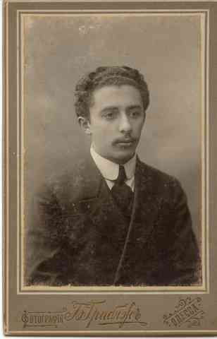 פורטרט משה שרת Moshe Sharett משה שרת אודסה 05 התקופה העות'מאנית 5